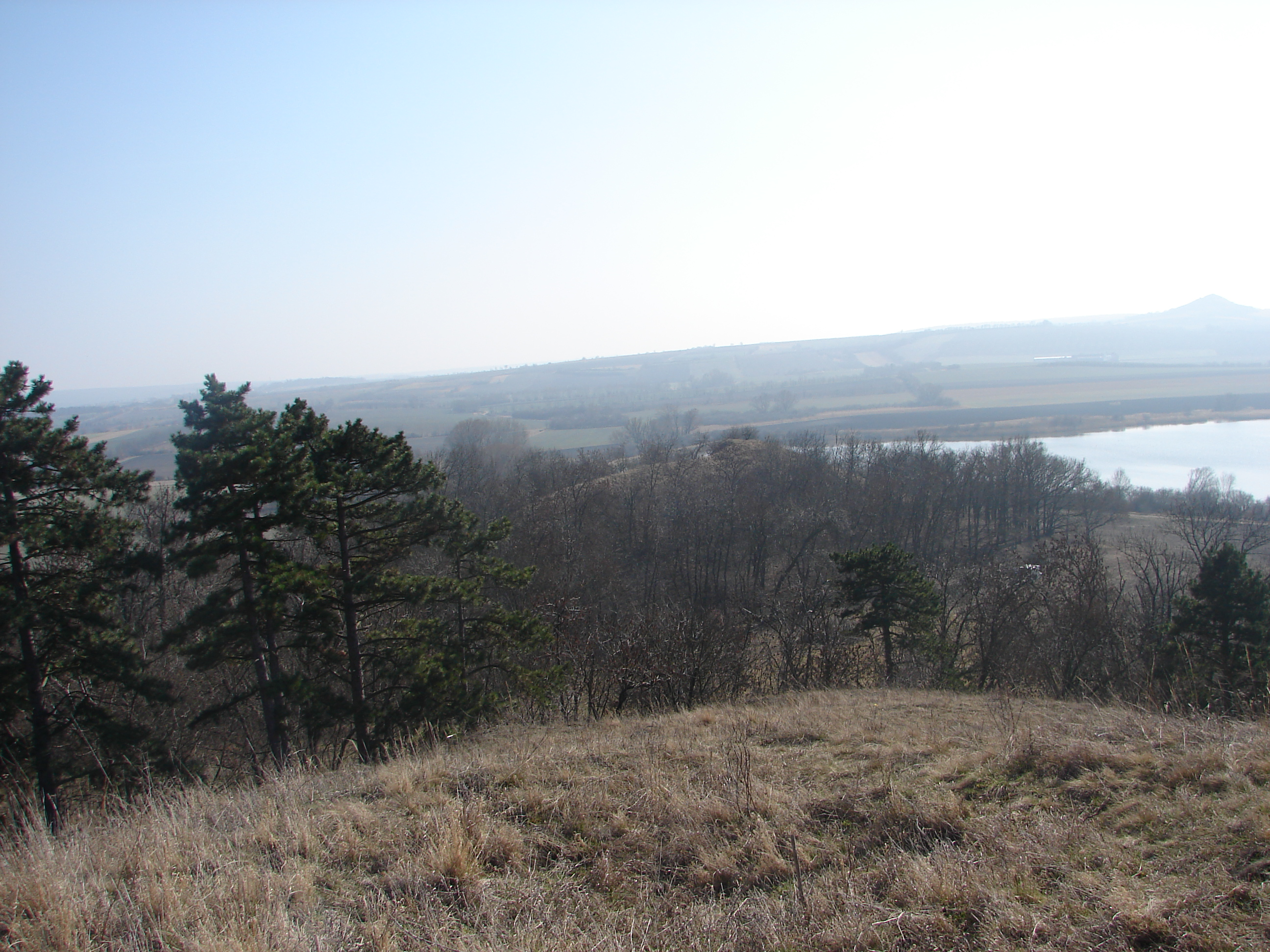 Pohled ze severní části PR na jižní.